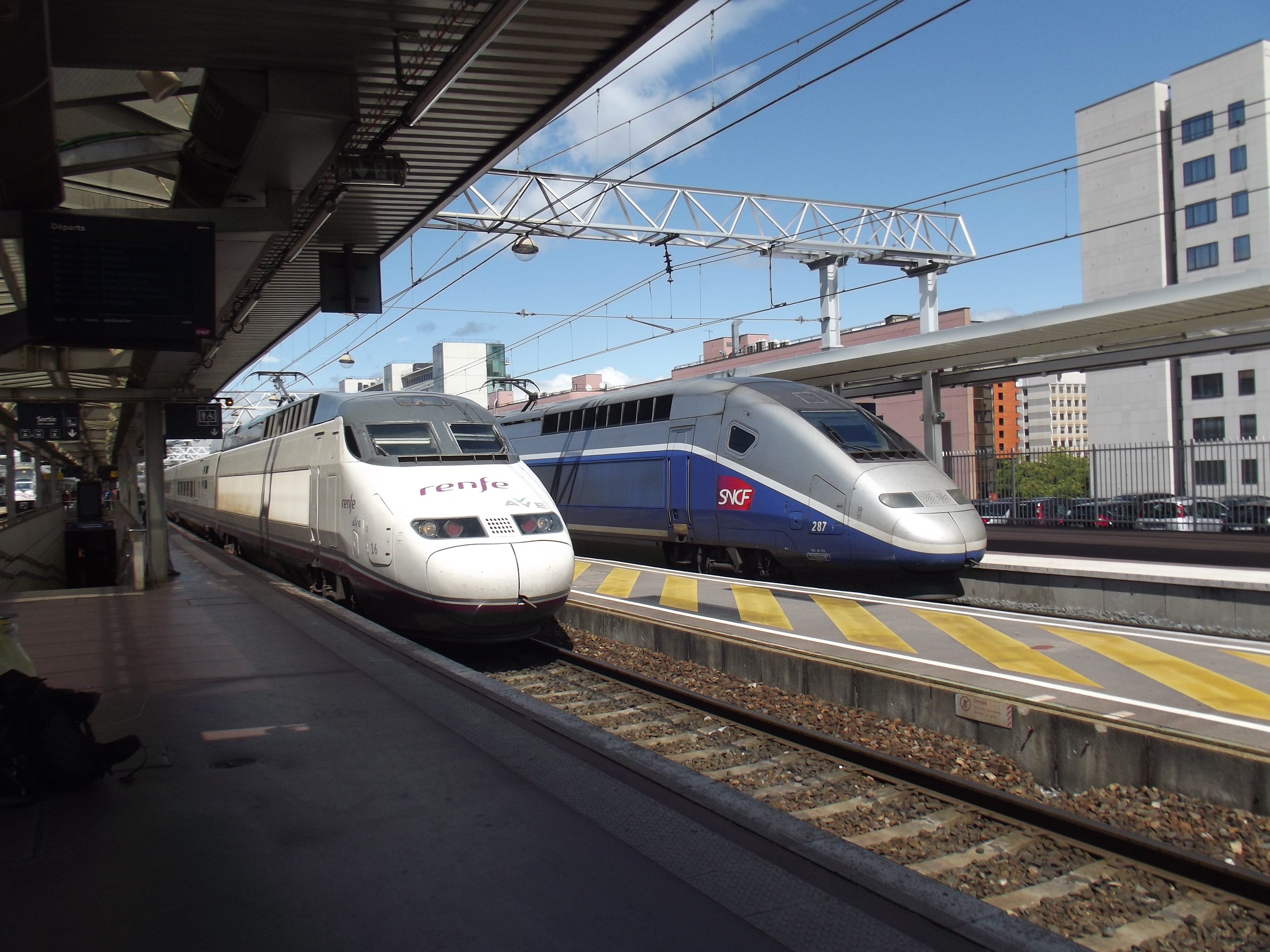 Vertrekkende AVE naar Barcelona naast een dubbeldekker TGV